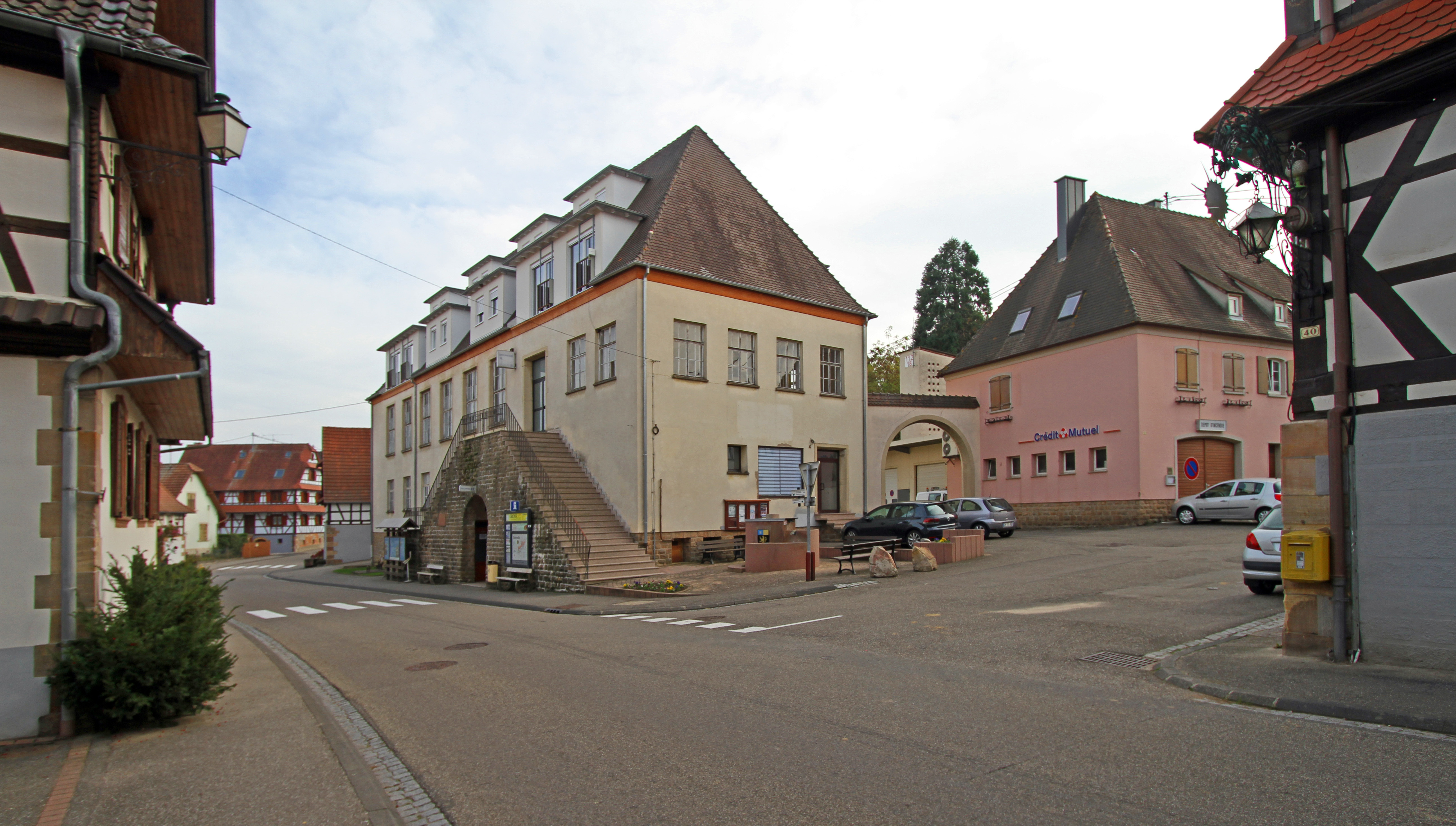 Steinseltz